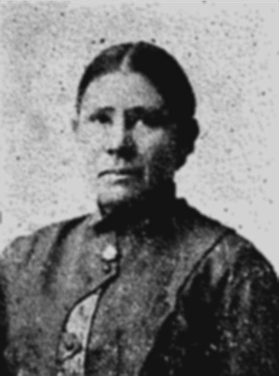 Margarita Ortega ¿?-1913. Anarquista mexicana fusilada en Mexicali.